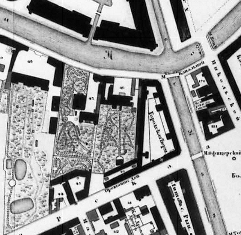 Подробный план Санкт-Петербурга 1828 года (Под начальством ген.-майора Шуберта). Фрагмент